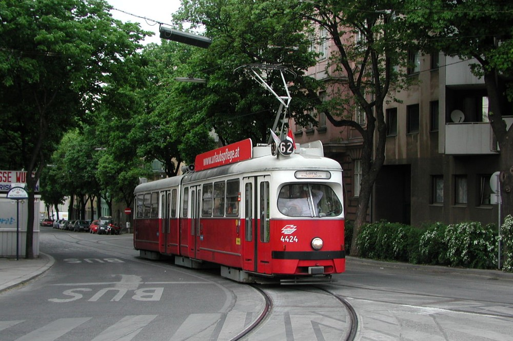 E-type tramcar on line "62" in Vienna's Meidling district - Triebwagen Type E auf Linie "62" im Wiener Bezirk Meidling own image Photographer: Martin Ortner, Vienna, Austria